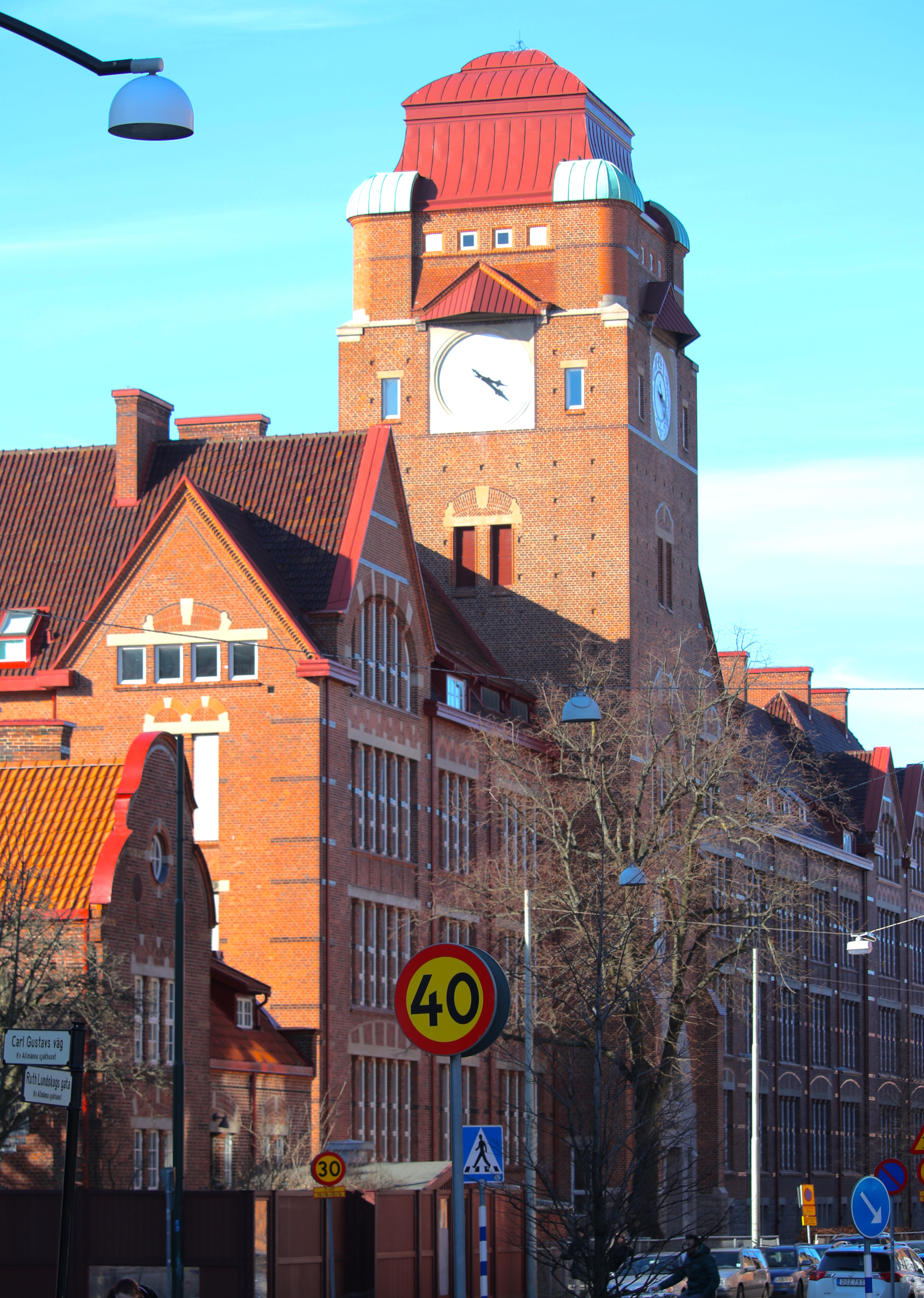 Johannesskolan, Malmö, mars 2016